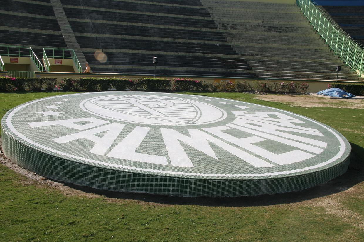 Símbolo do Palmeiras construído no Estádio Palestra Itália